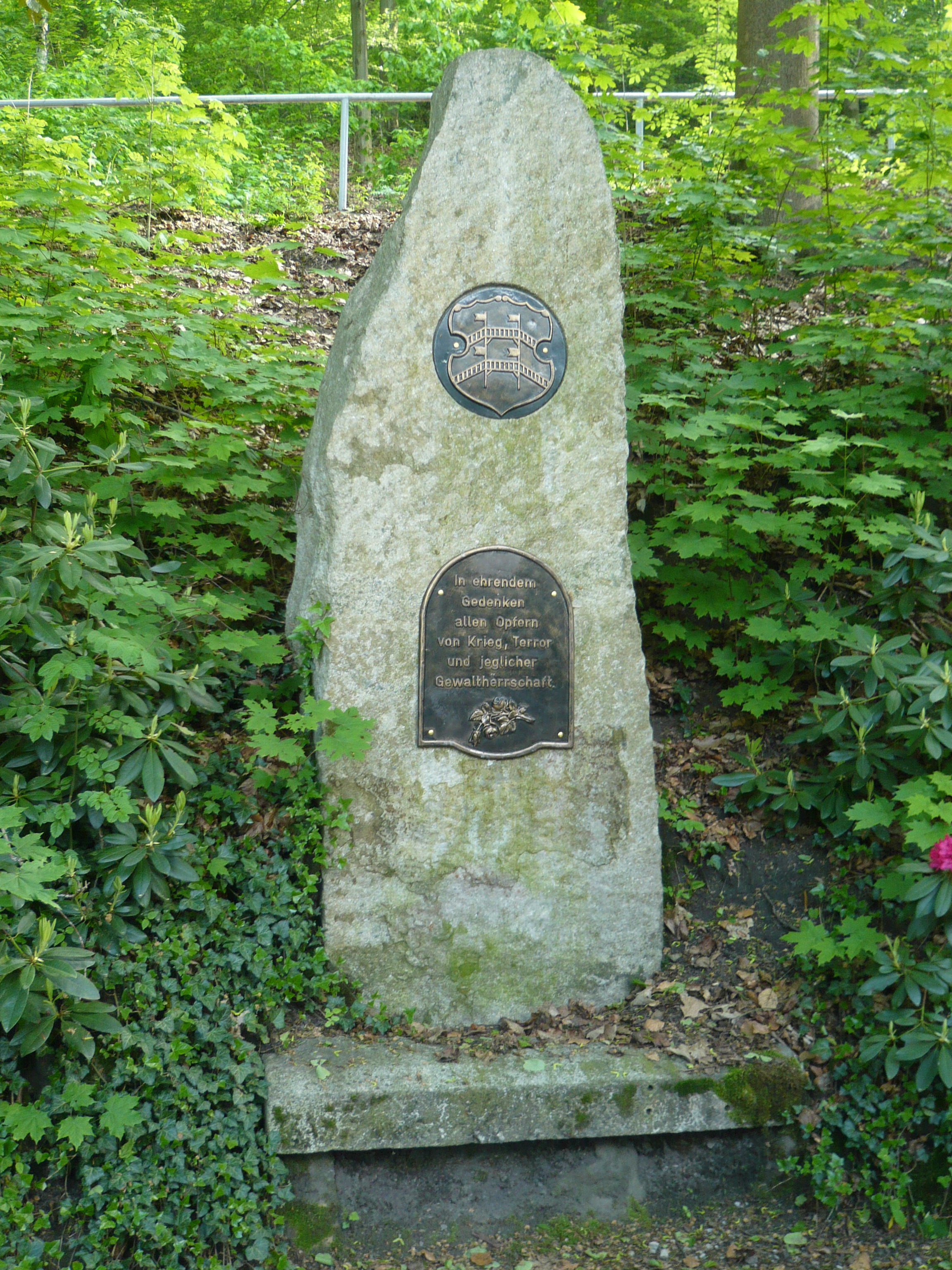 Stadt Aue, Kriegerdenkmal auf dem Friedhof